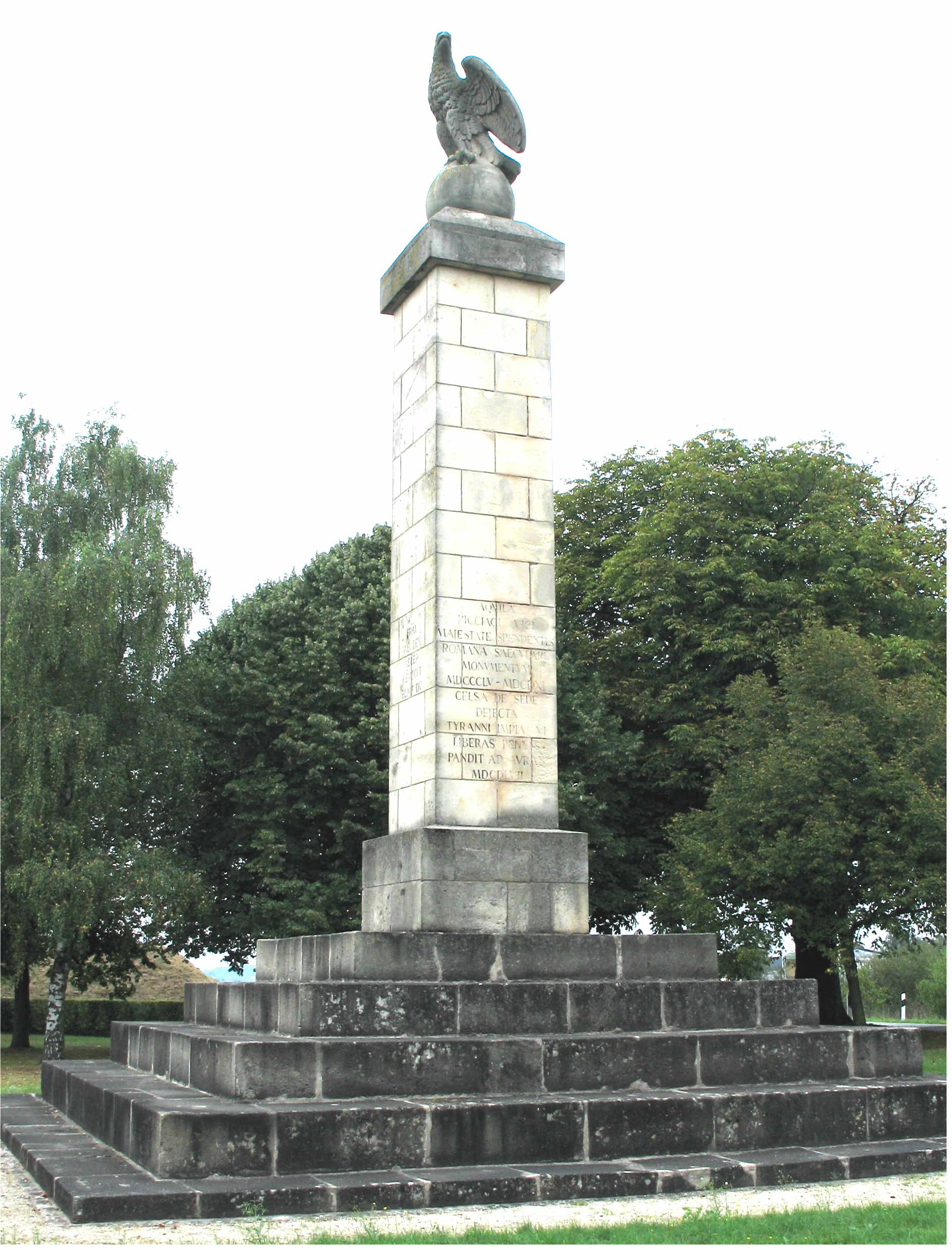 Den Adler vun Duelem (Réimech). Adler Adler Duelem